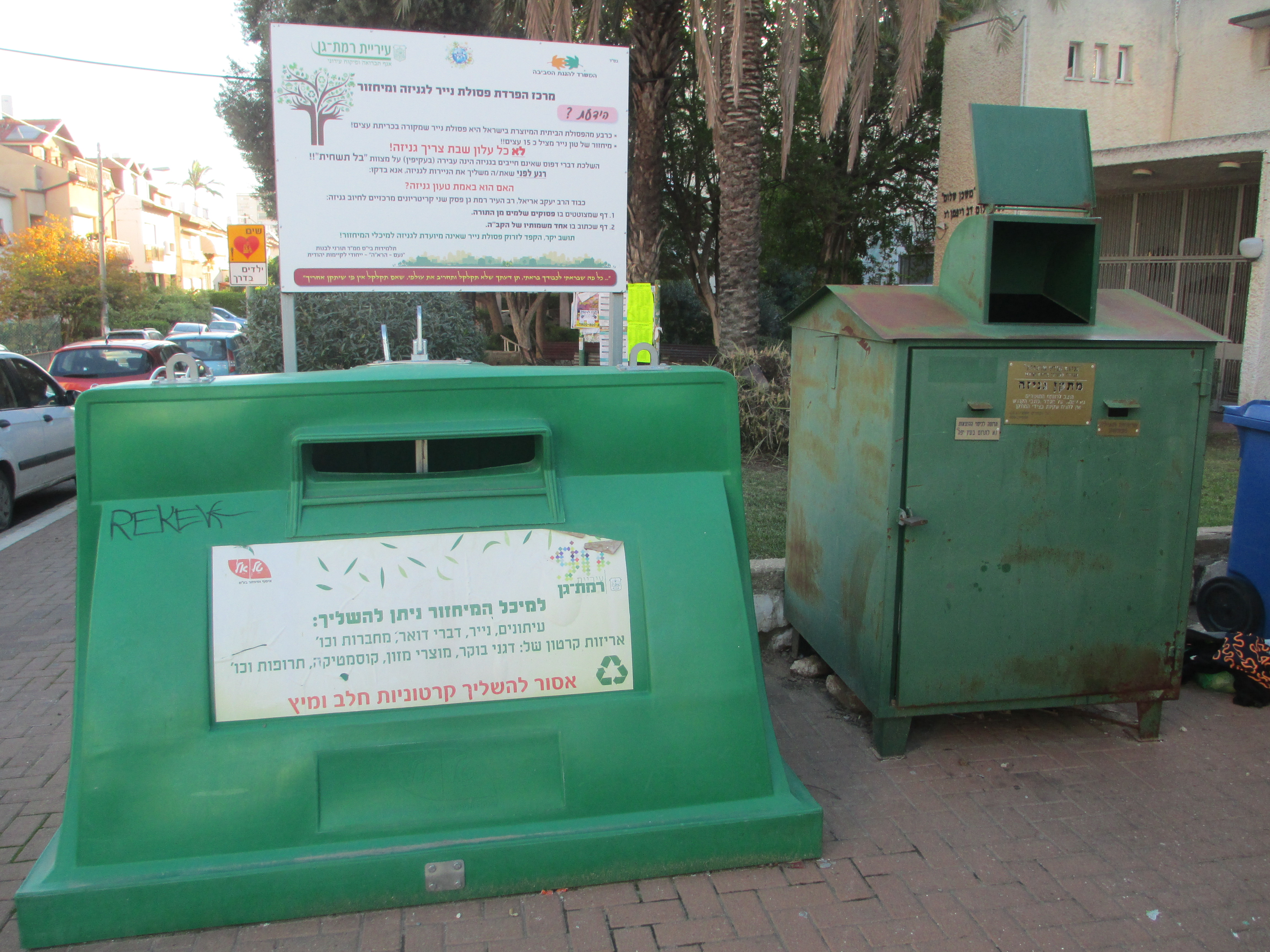 מיכלי מחזור וגניזה ברמת גן